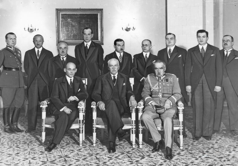 Polish Government under Prime Minister Janusz Jędrzejewicz 1933